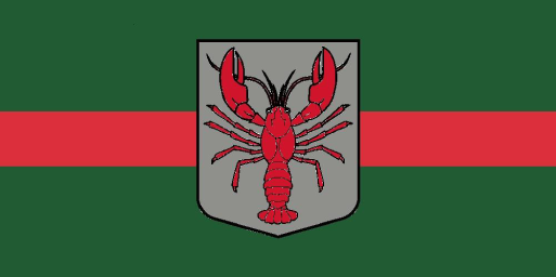 Laidzes pagasta karogs